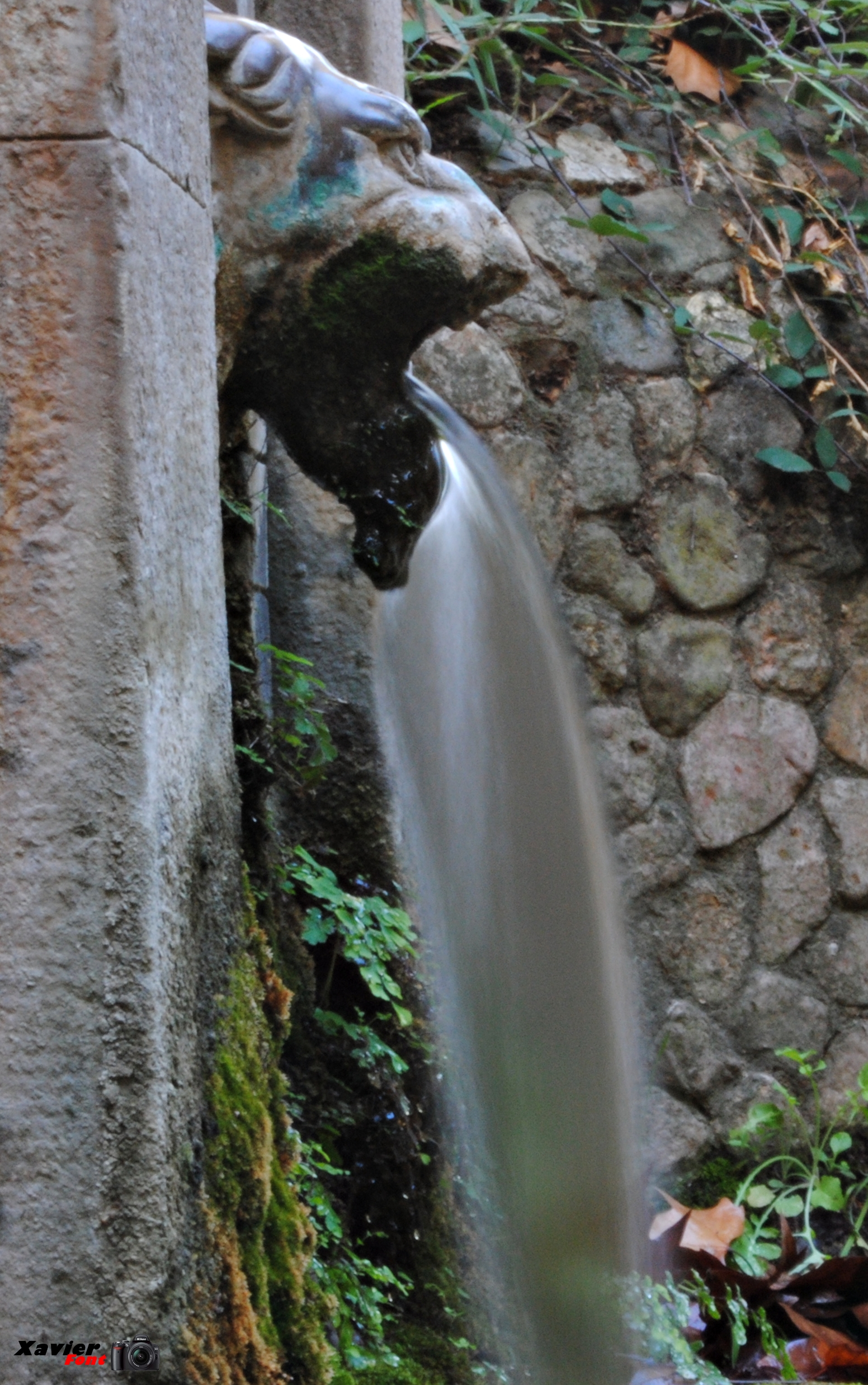 Lleó de la Font de Ca l'Argelich